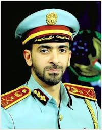 سمو الشيخ سيف بن زايد ال نهيان